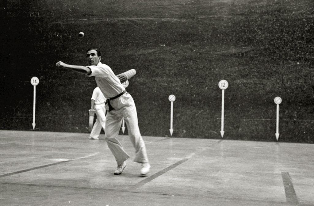 FINAL DE CAMPEONATO DE ESPAÑA DE REMONTE ENTRE SALSAMENDI III Y ABREGO I EN EL FRONTON URUMEAEuskara: 1944ko Espainiako Erremonte Txapelketaren finala, Abrego eta Salsamendi III.aren artekoa, Donostiako Urumea frontoian. Irudian Jesus Abrego.